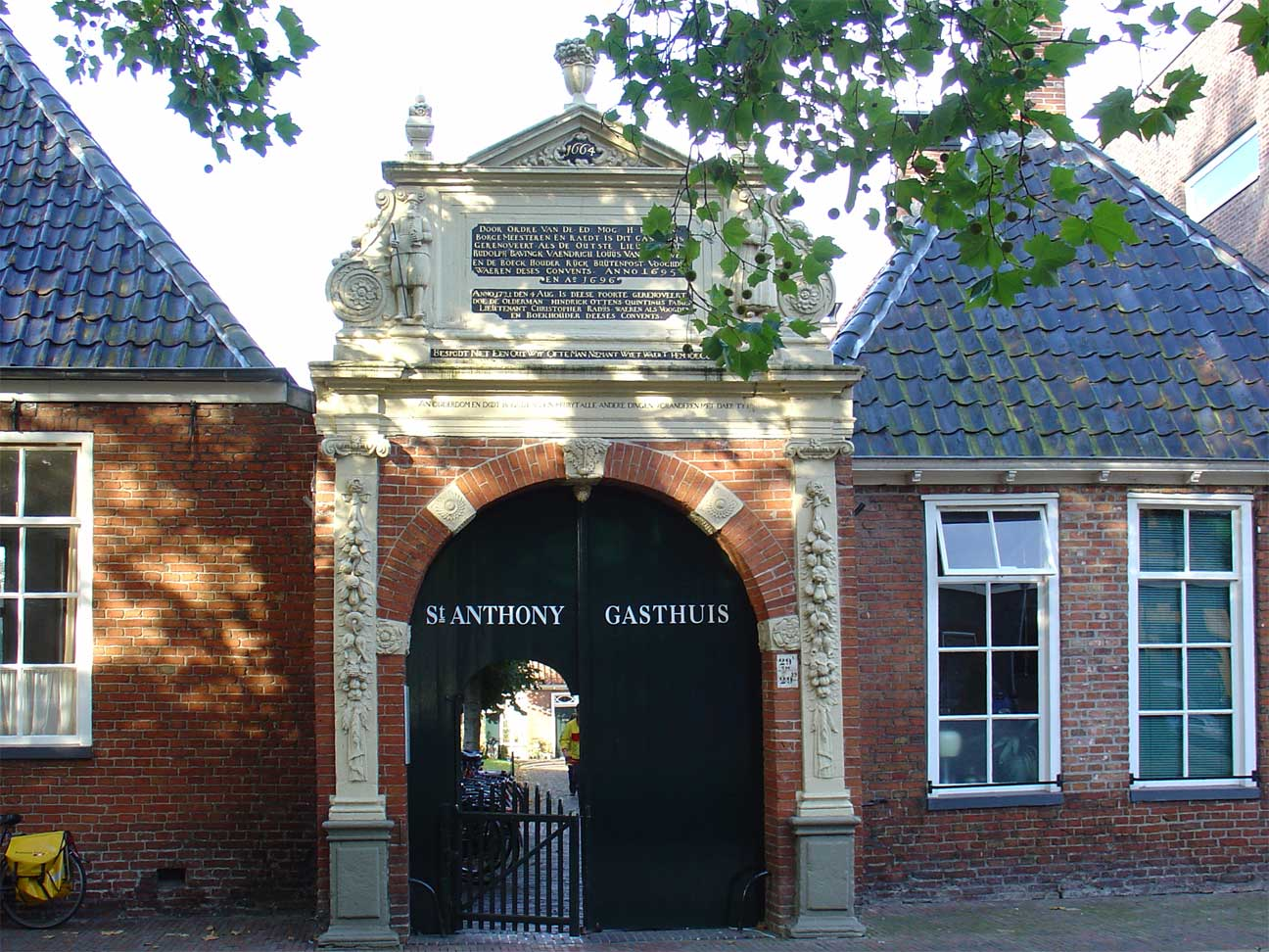 Het Sint Anthonygasthuis te Groningen